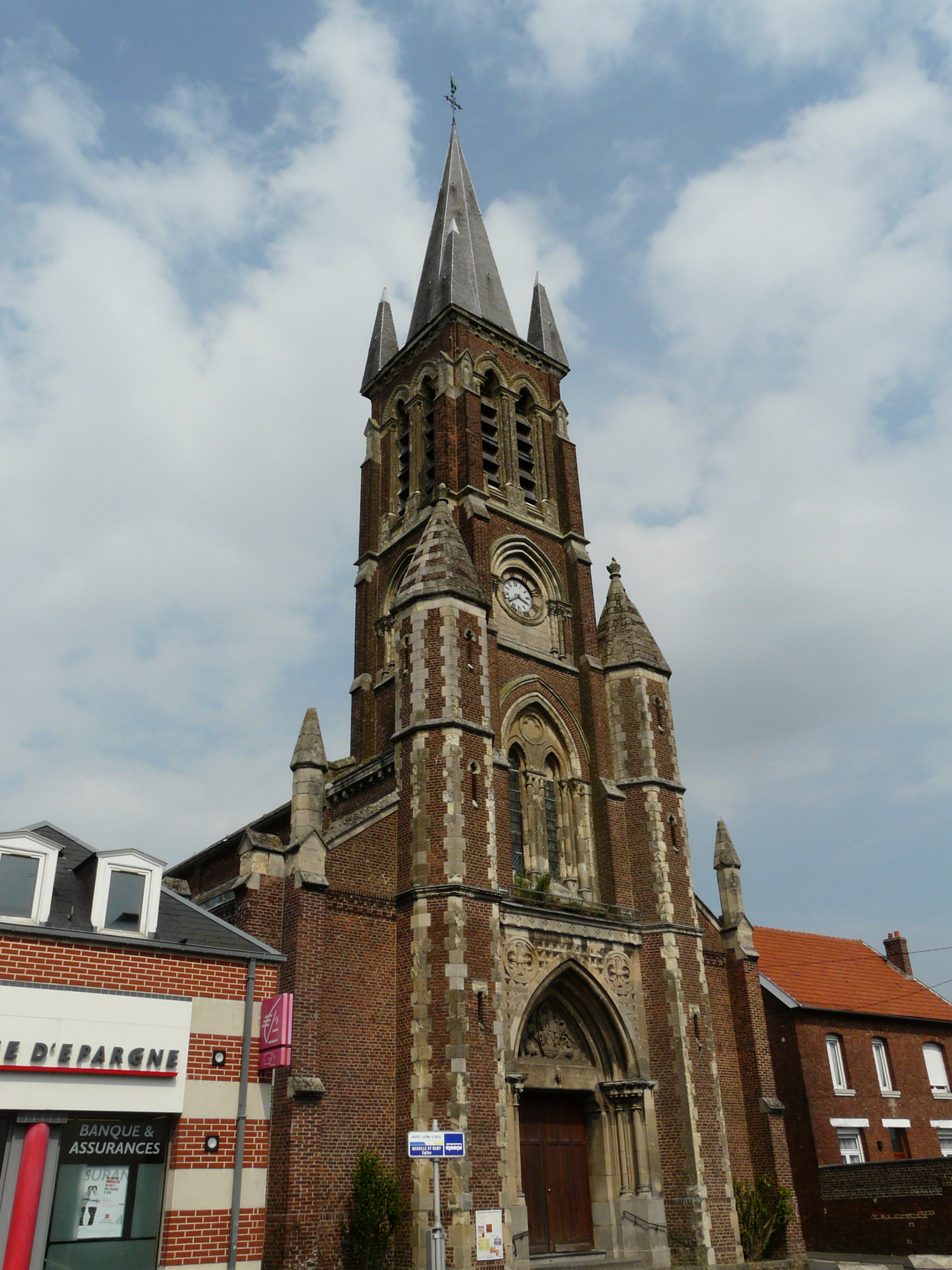 Église de Neuville-Saint-Rémy (Nord, France)